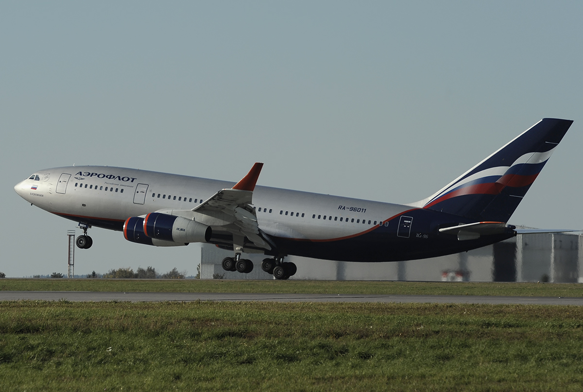 "Aeroflot"Il-96 RA-96011